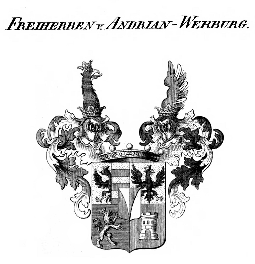 Wappen Andrian Werburg - Tyroff AT.jpg